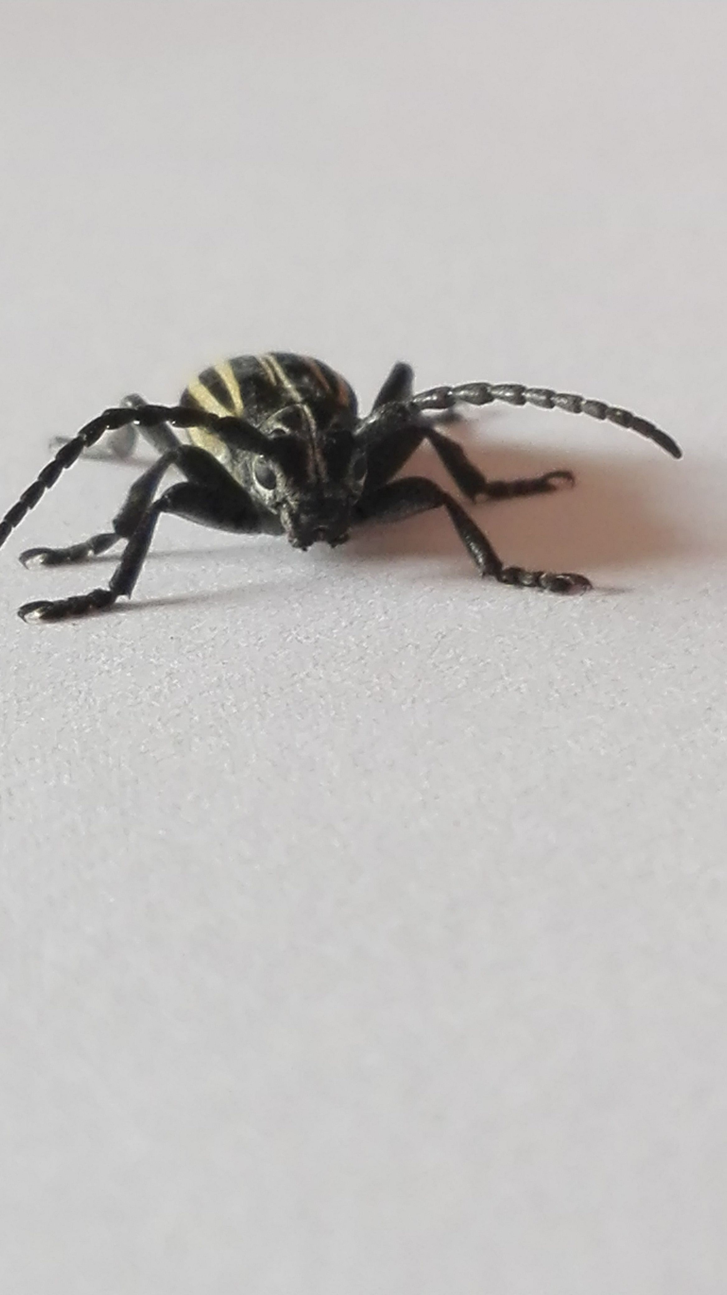 Dorcadion scopolii